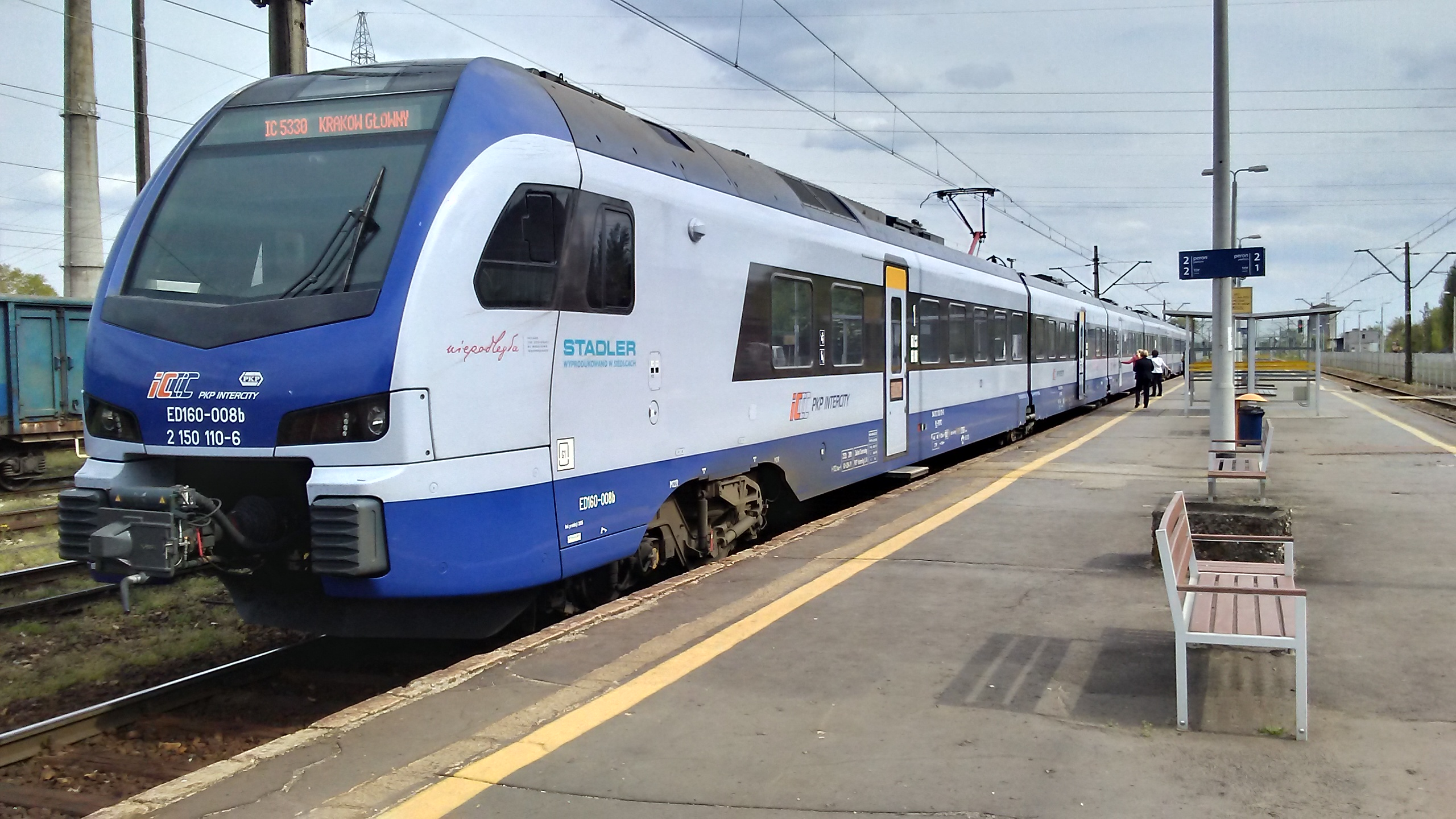 Tomaszów Mazowiecki - InterCity do Krakowa na stacji kolejowej.